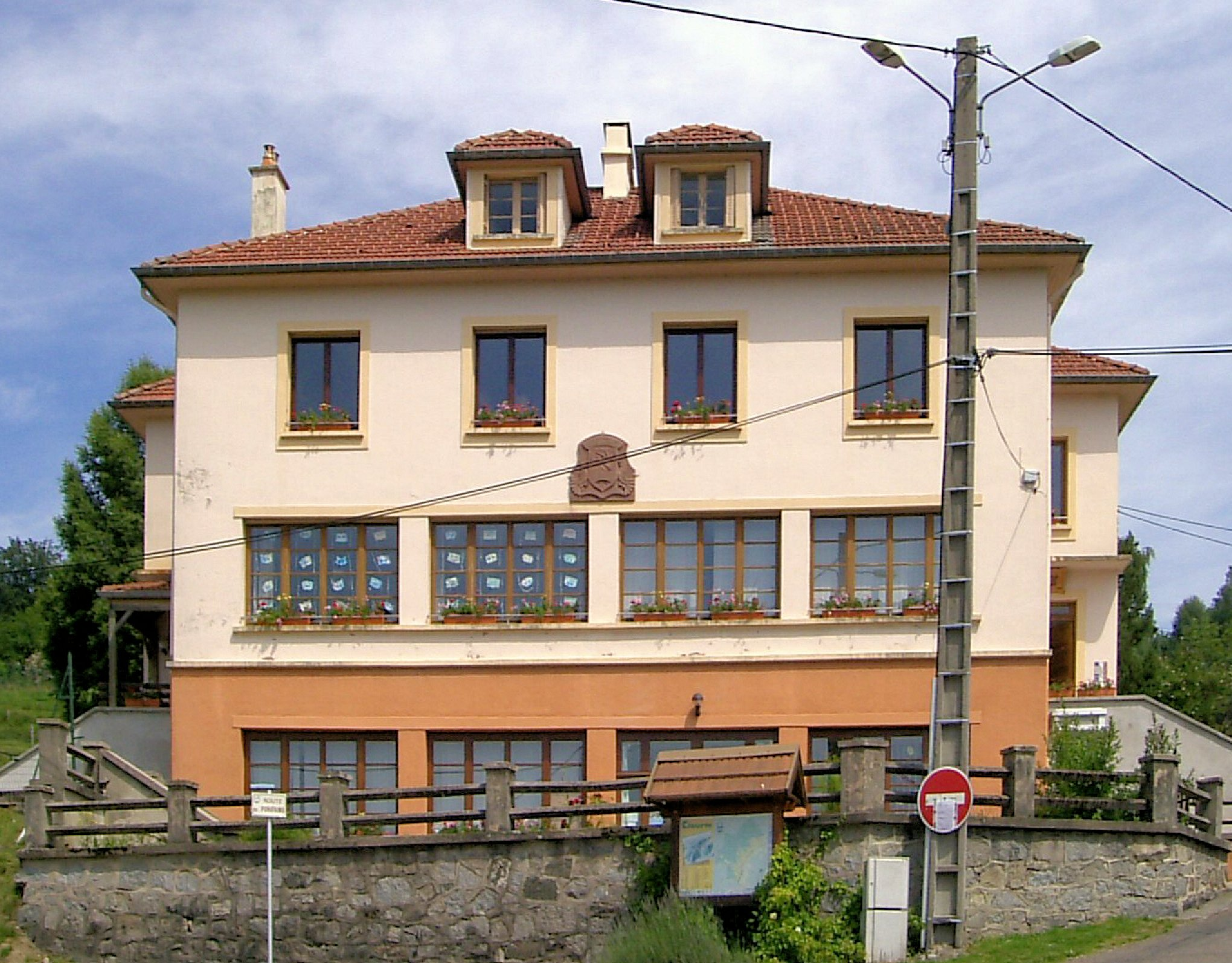 La Mairie-école de Cleurie